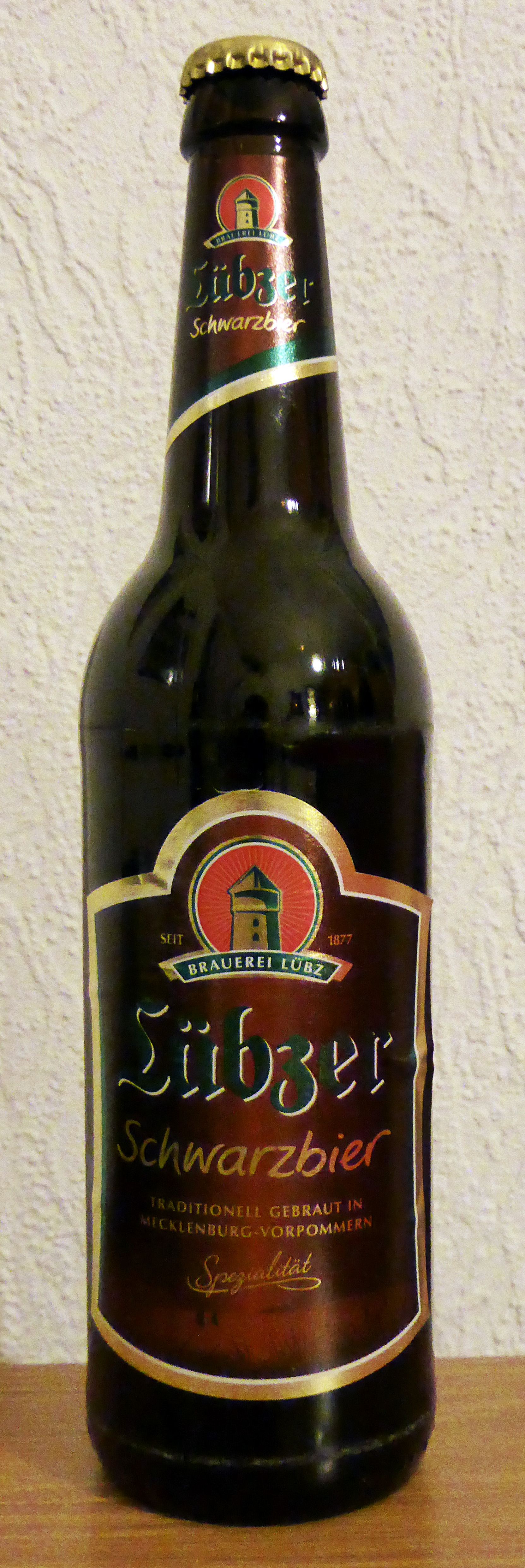 Flasche Lübzer-Schwarzbier, 2014.